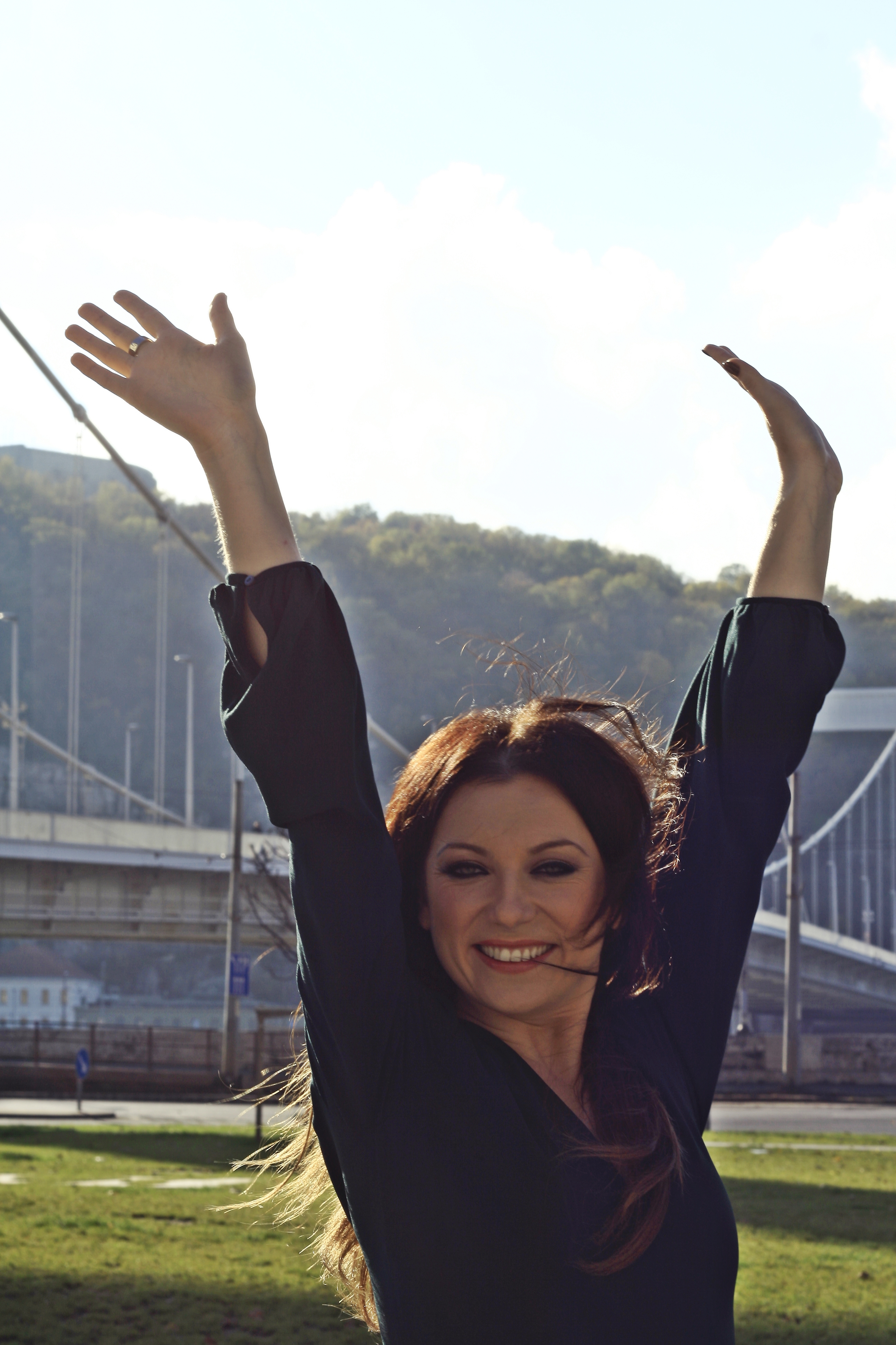 Rúzsa Magdi fotózás az Erzsébet-hídnál (2012).